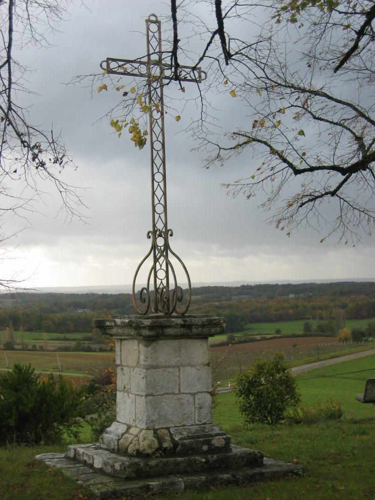 La Croix sur les Promenades Lieu : Soumensac Lot et Garonne Date de prise de vue : novembre 2006 Auteur : Jacques David